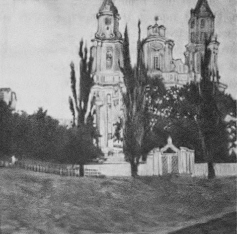 Беларуская (тарашкевіца): Глыбокае (Hłybokaje), Беразьвечча (Bieraźviečča). Царква Сьвятых Апосталаў Пятра і Паўла і манастыр базылянаў